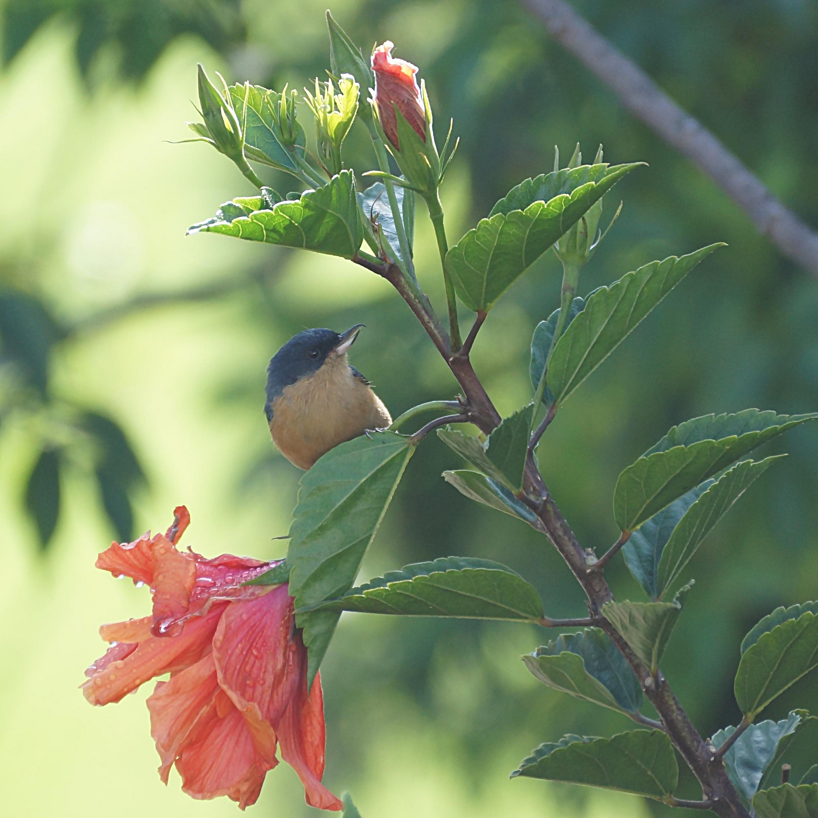 Diglossa sittoides macho junto a una flor para dar idea de su pequeño tamaño